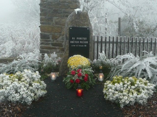 Pomník věnovaný obětem požáru, při němž vyhořel Ústav sociální péče v Měděnci.